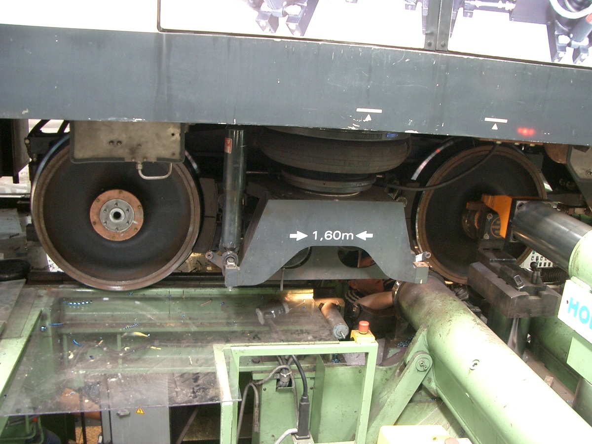 U-Bahn München Typ B Wagen 7498 mit dem Siemens Syntegra Drehgestell